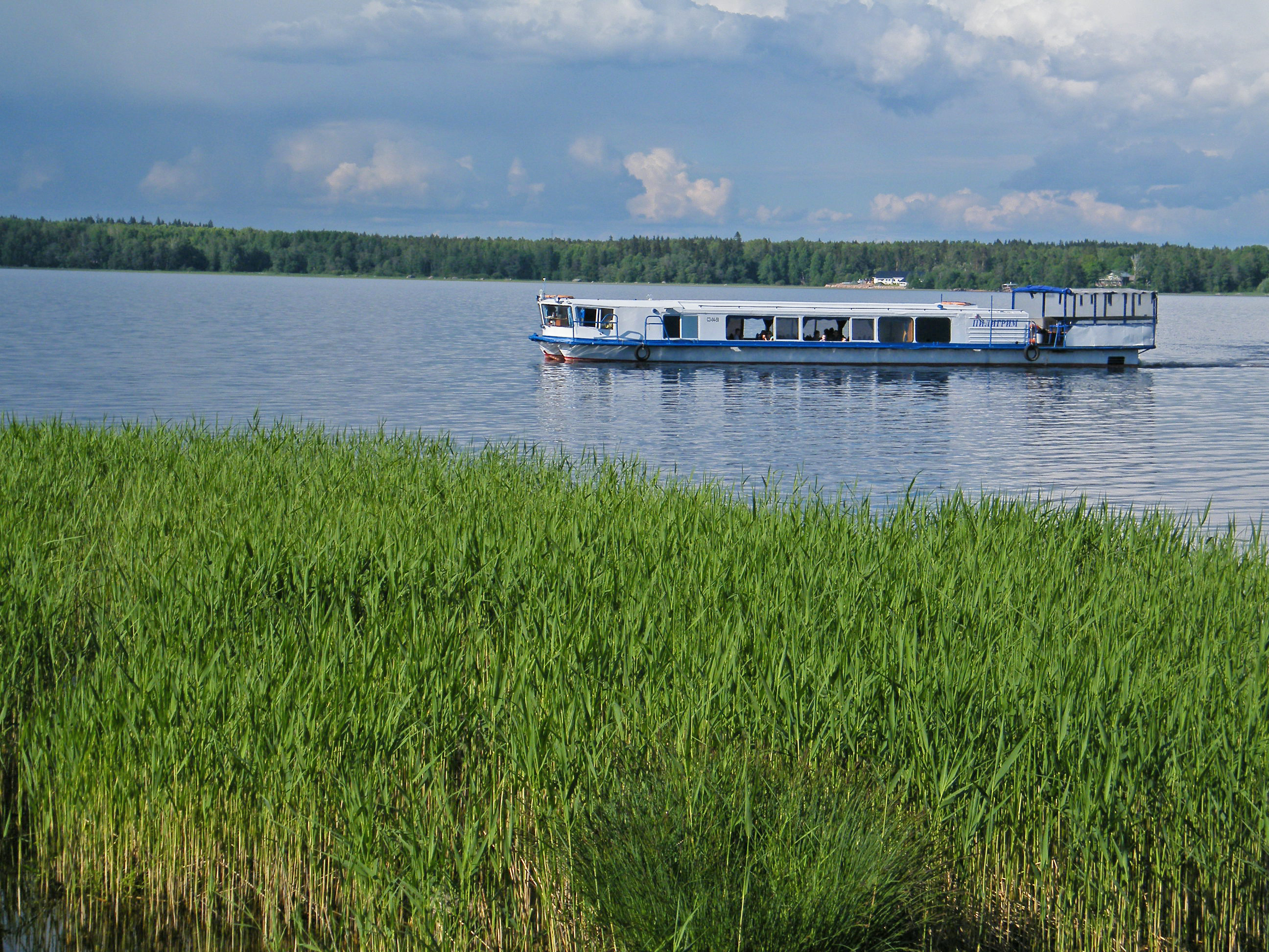 Прогулочное судно